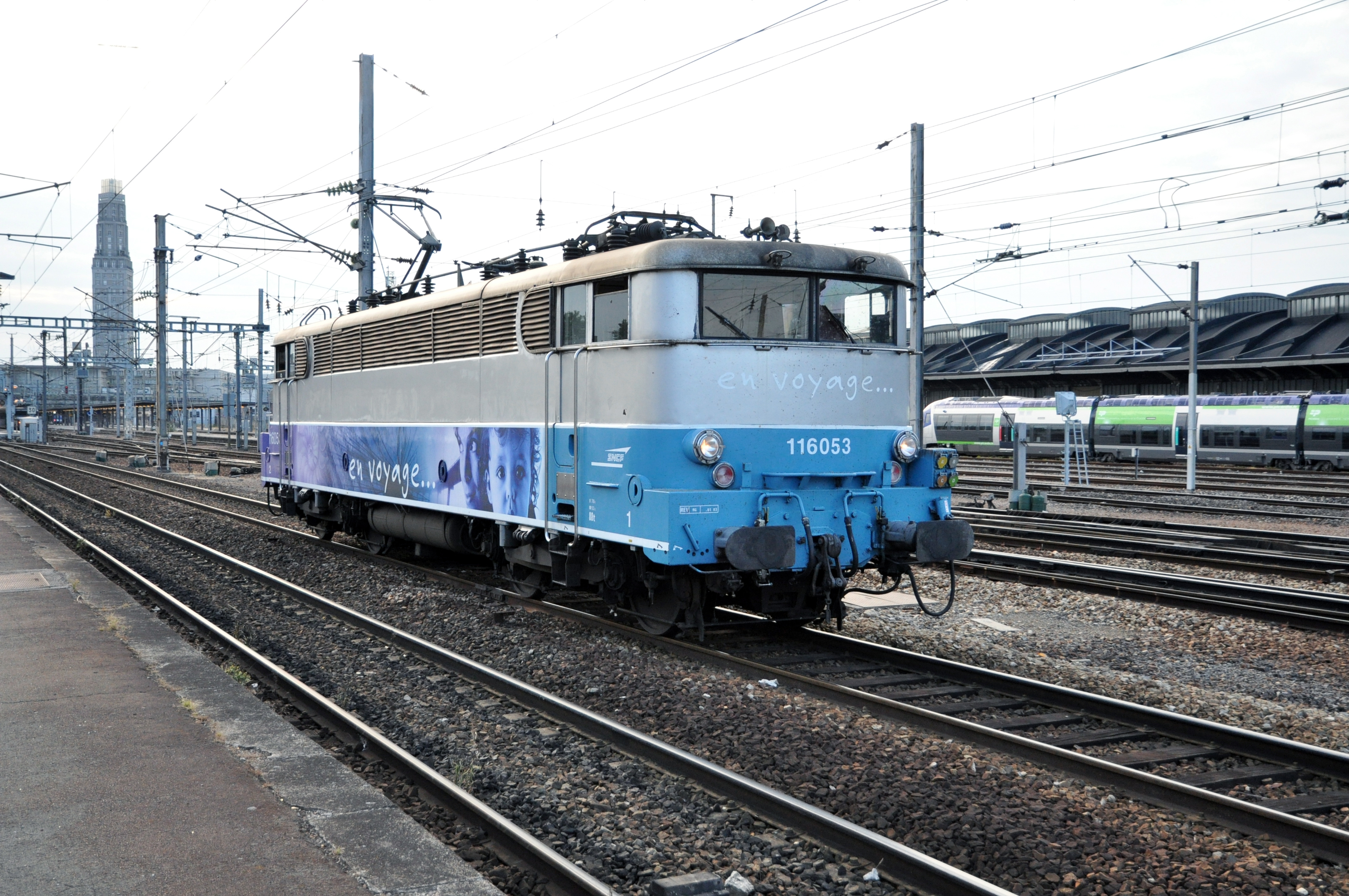 en refoulement vers le dépot d'Amiens